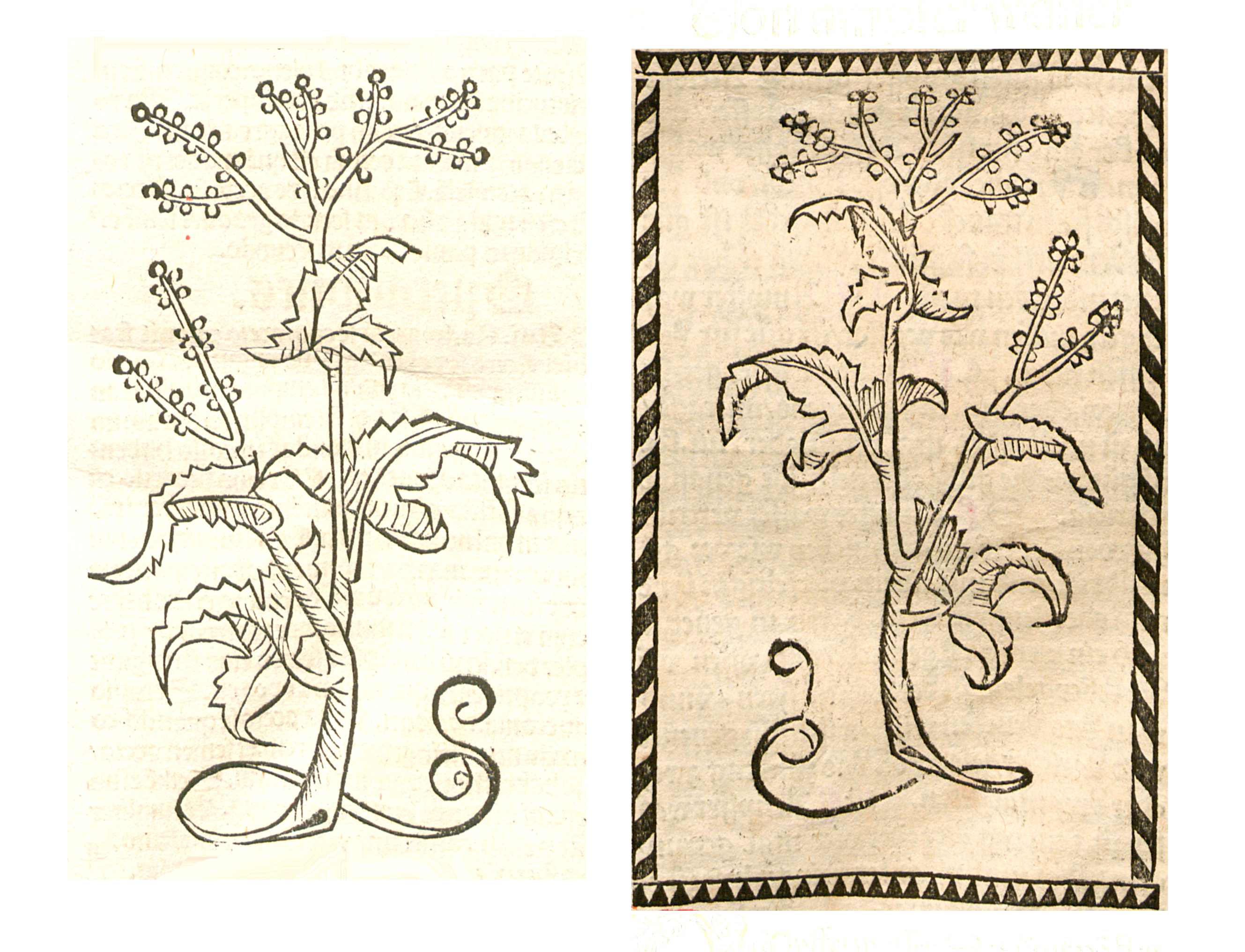 Abbildung von Ampfer (Oxalis acetosella)